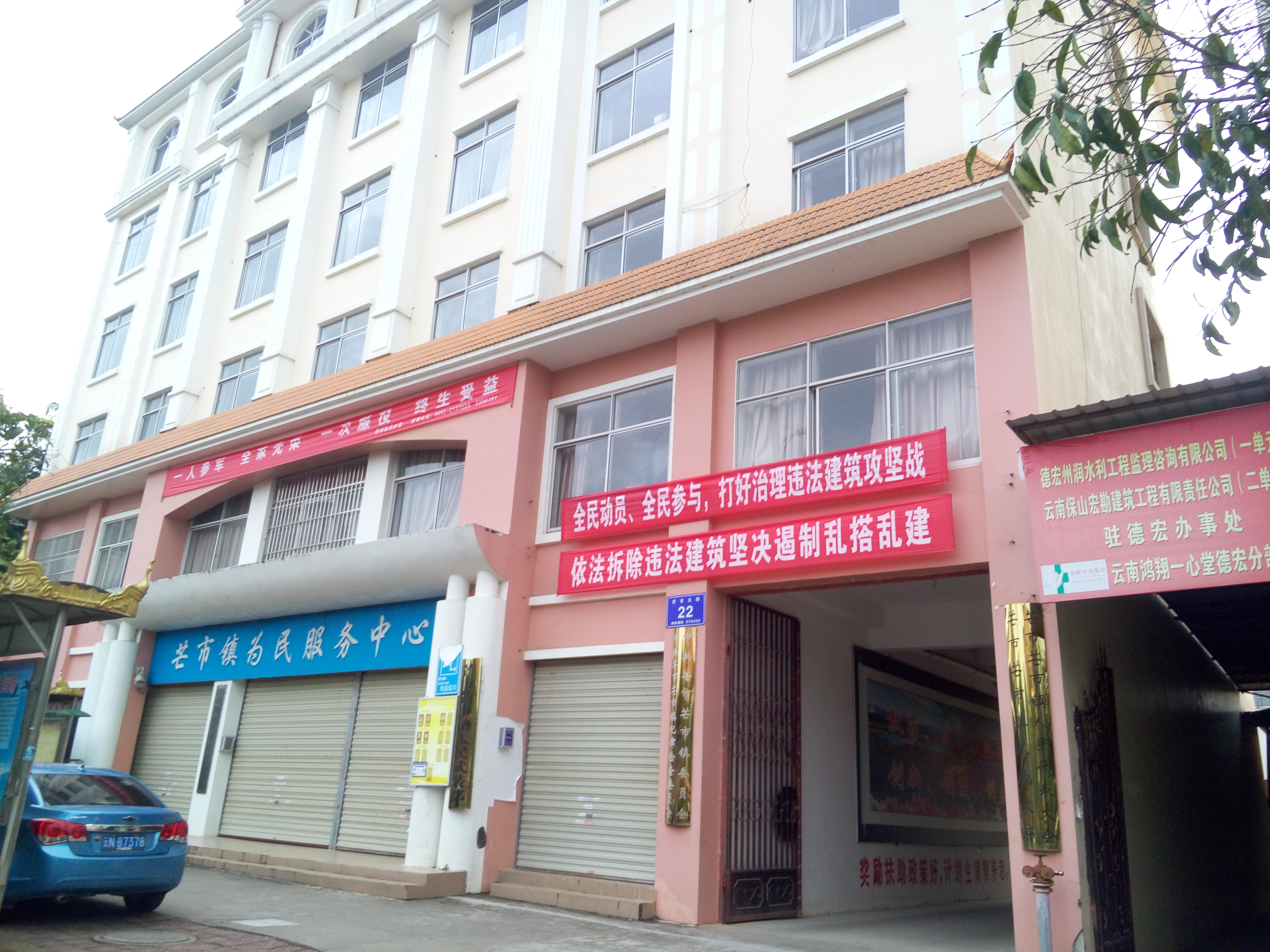 芒市镇人民政府